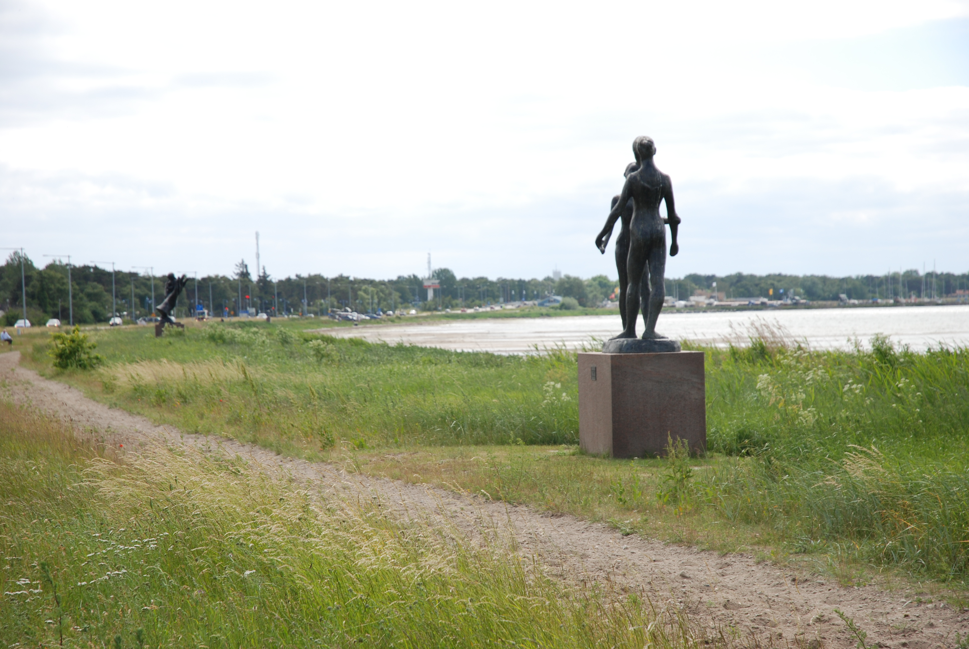 Gudmar Olovson´s Les deux soeurs, Falserbonäs Open Air Museum, Höllviken, Vellinge, Sweden